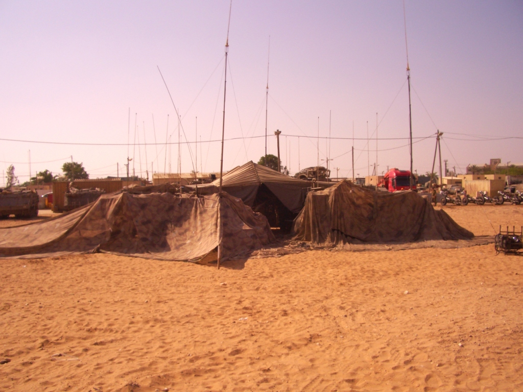 מפקדת אגד 632